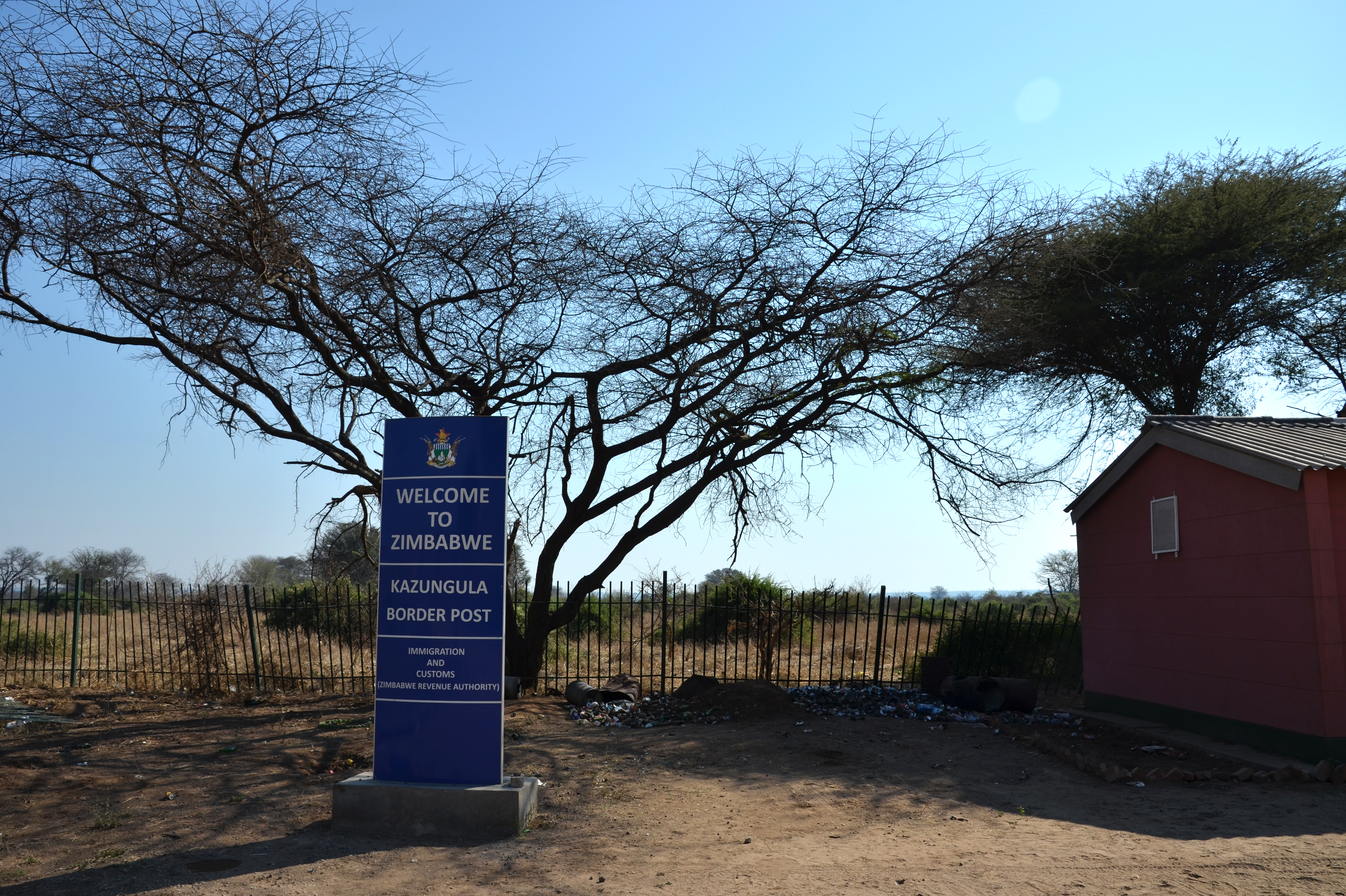 Vítejte v Zimbabwe